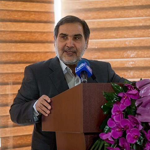 محمد فروزنده در مراسم تودیع و معارفه رئیس بنیاد مستضعفان